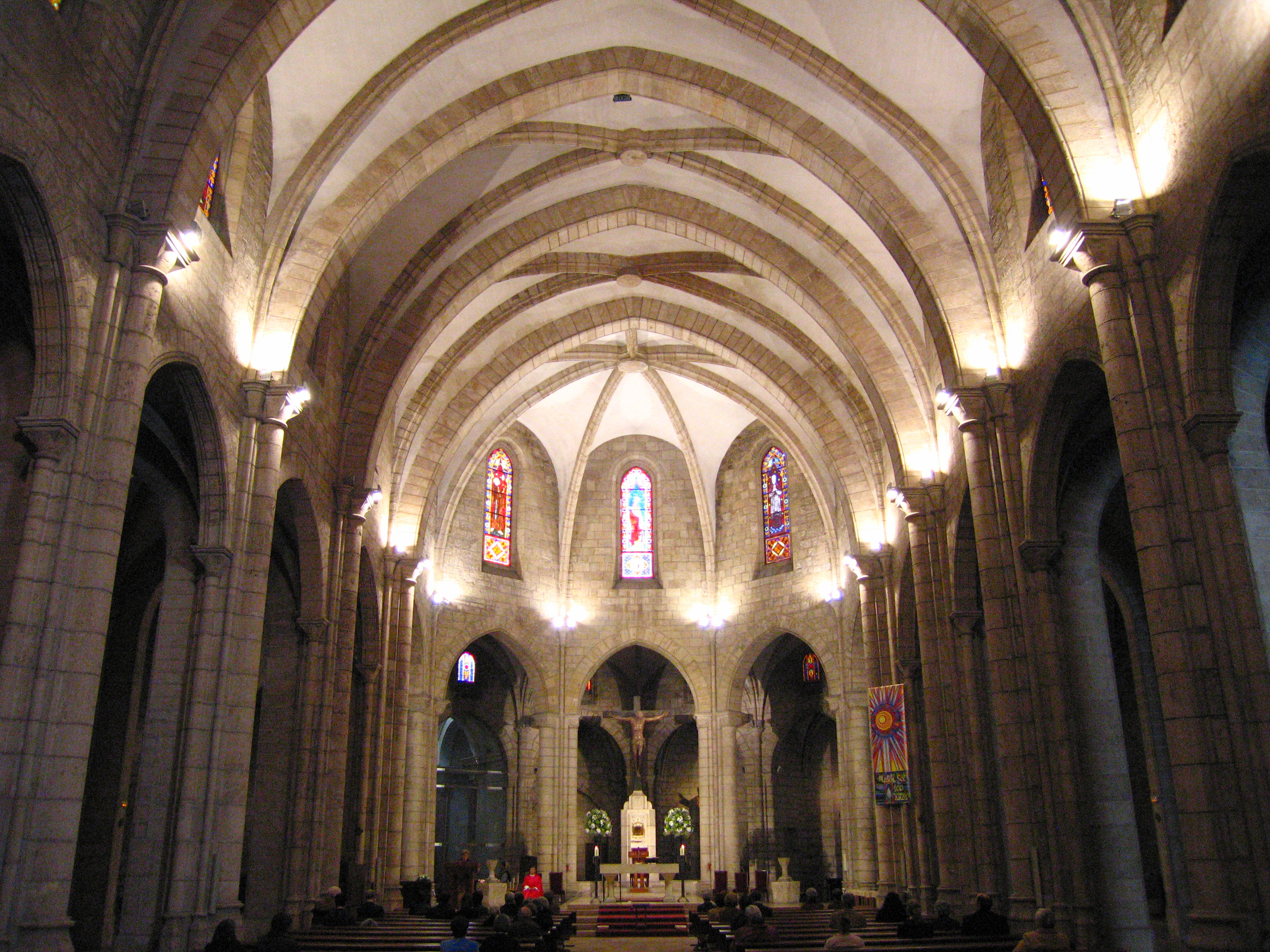 Interior de Santa Caterina de València